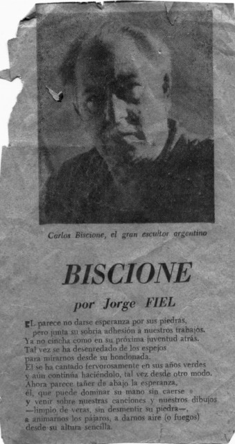 Publicación cultural